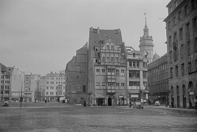 Original image description from the Deutsche Fotothek Vorderansicht von Häusern auf der Reichsstraße, u.a. des Riquethauses